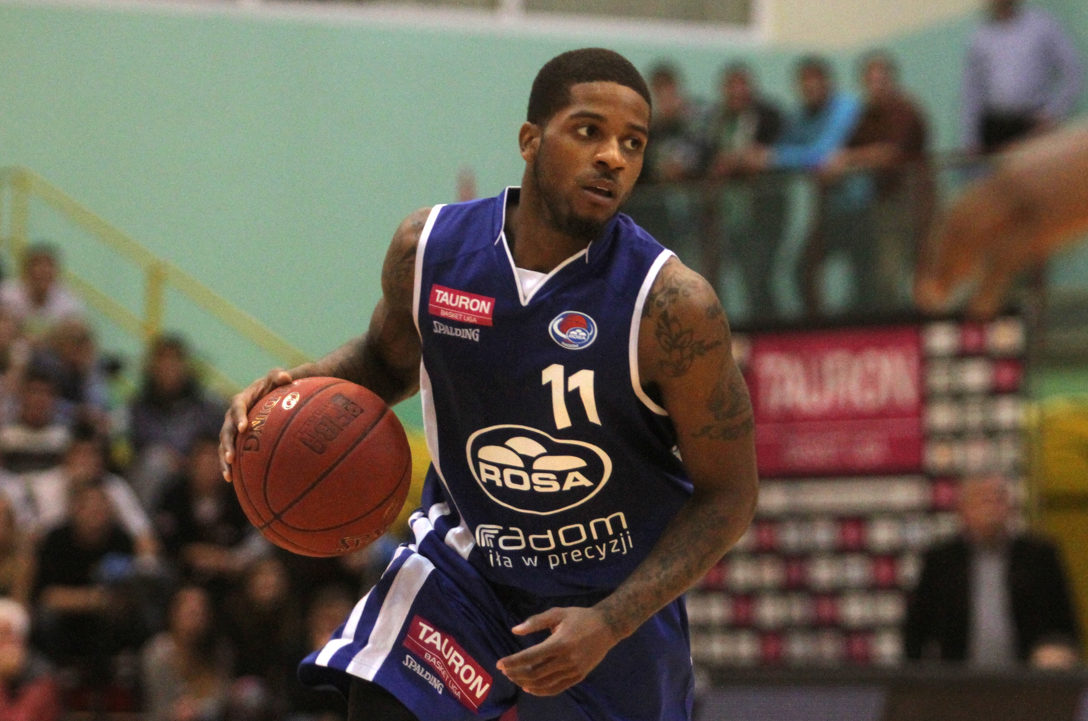 Korie Lucious, Rosa Radom